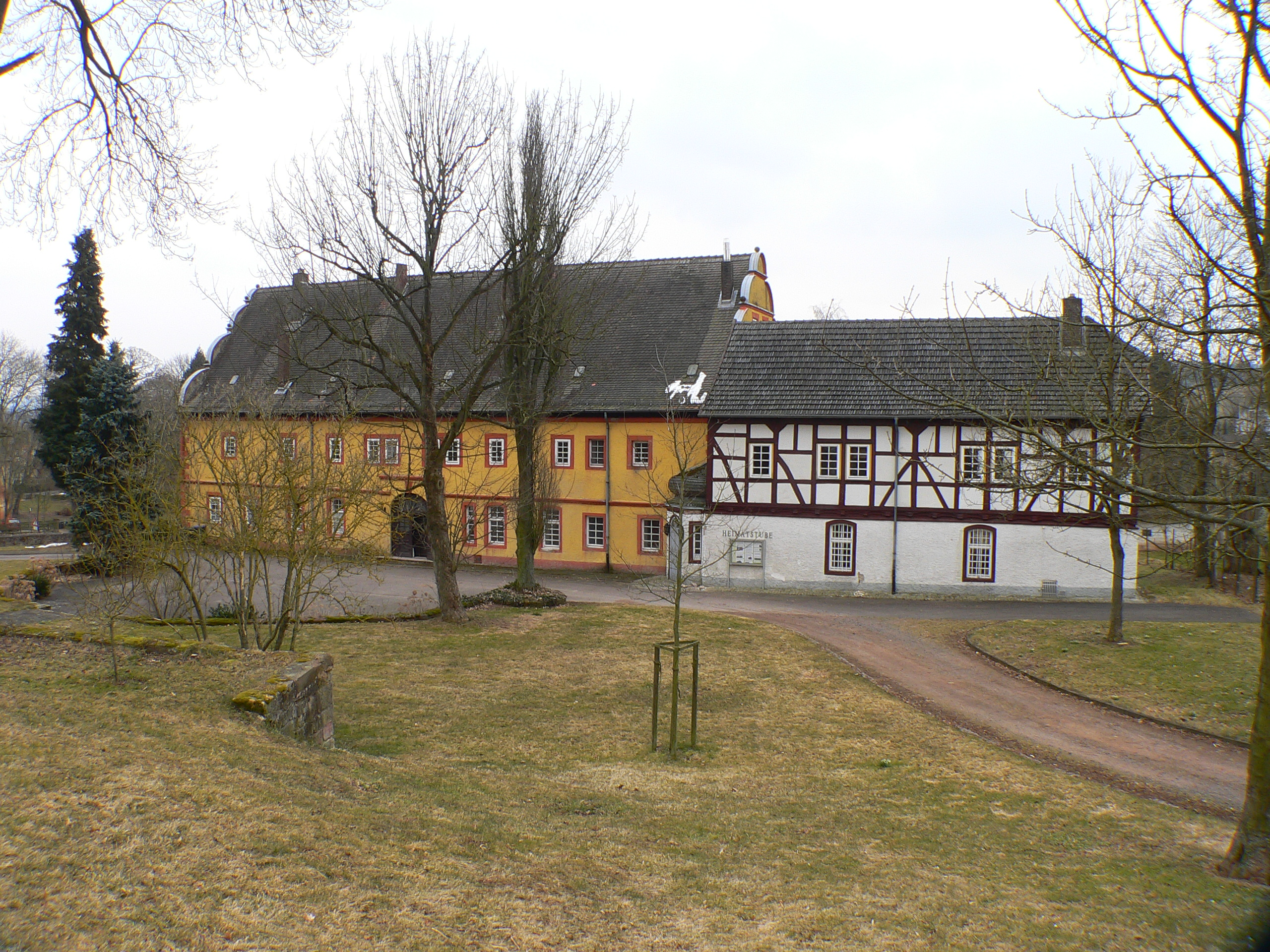 Geyso-Schloss Mansbach (Ostansicht) in Hohenroda-Mansbach, Hessen, Regierungsbezirk Kassel, Landkreis Hersfeld-Rotenburg